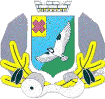 Герб Волжска